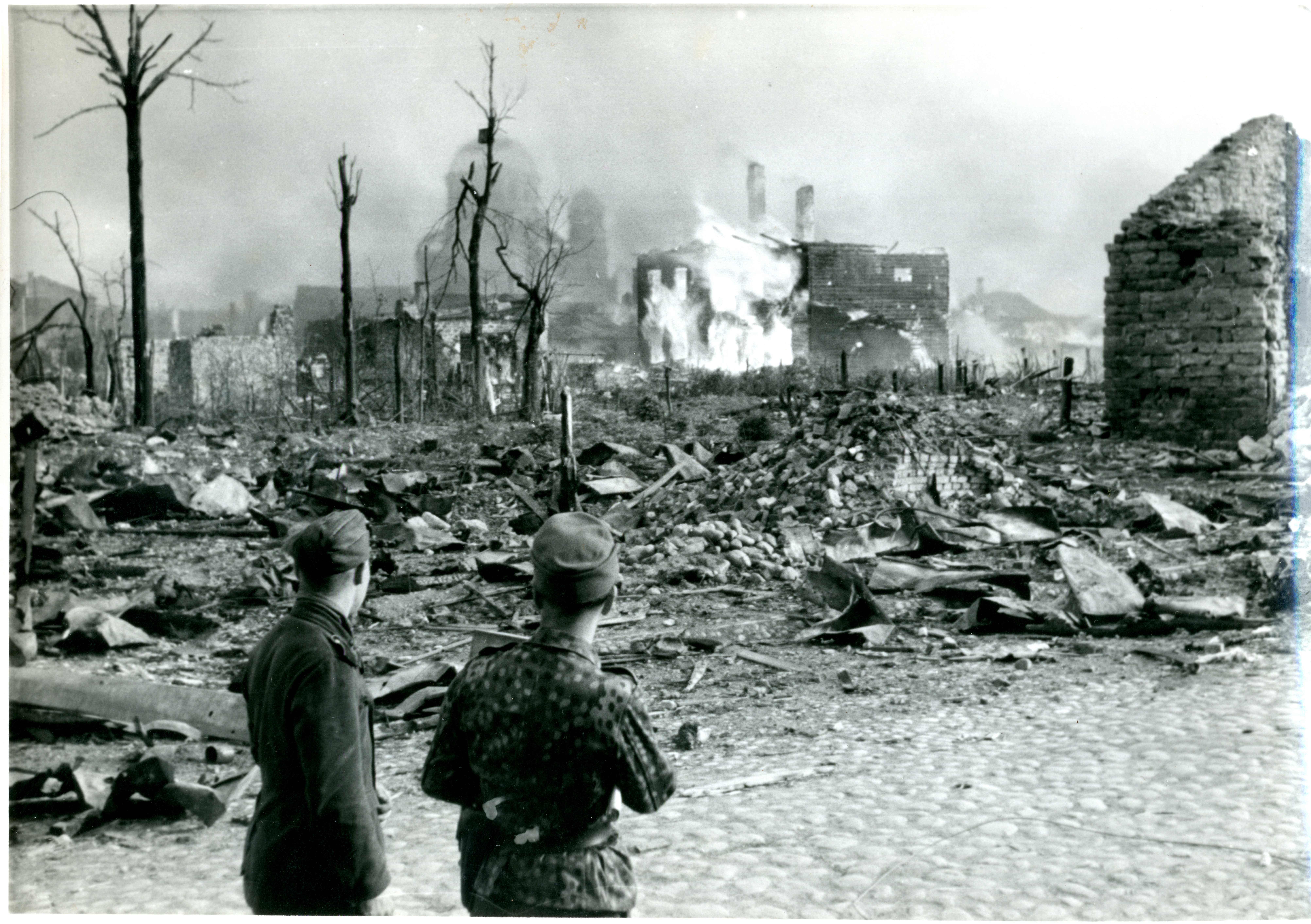 Bildet er hentet fra Arkivverket. Ødeleggelser etter kampene ved Narvafronten. Foto tilhørende landssviksak, domsnummer 2506, Oslo Politikammer. Her er Narva by rett etter et angrep. Bygningene brenner enda. Arkivinstitusjon : Riksarkivet Arkivnavn : Landssvikarkivet Sted : Estland, Ukjent, Ukjent, Narva Emneord: Krig, Narvafronten, Menn, Andre verdenskrig, 2. verdenskrig, Brann Avbildet: Andersen, Leif